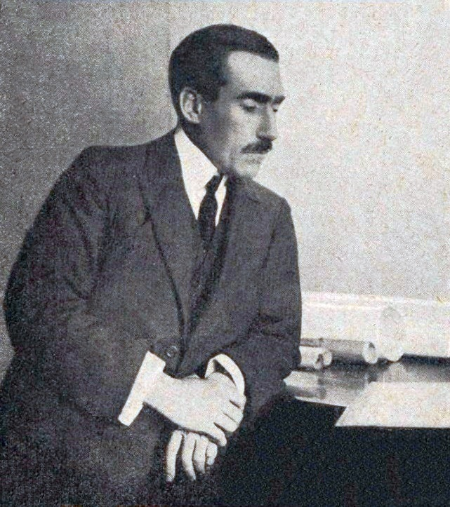 Louis Renault en 1918 - Automobilia-L'Automobile aux Armées, 31 octobre 1918, n°35, revue bi-mensuelle illustrée, p.36 (article Louis Renault, le "Henry Ford" français).